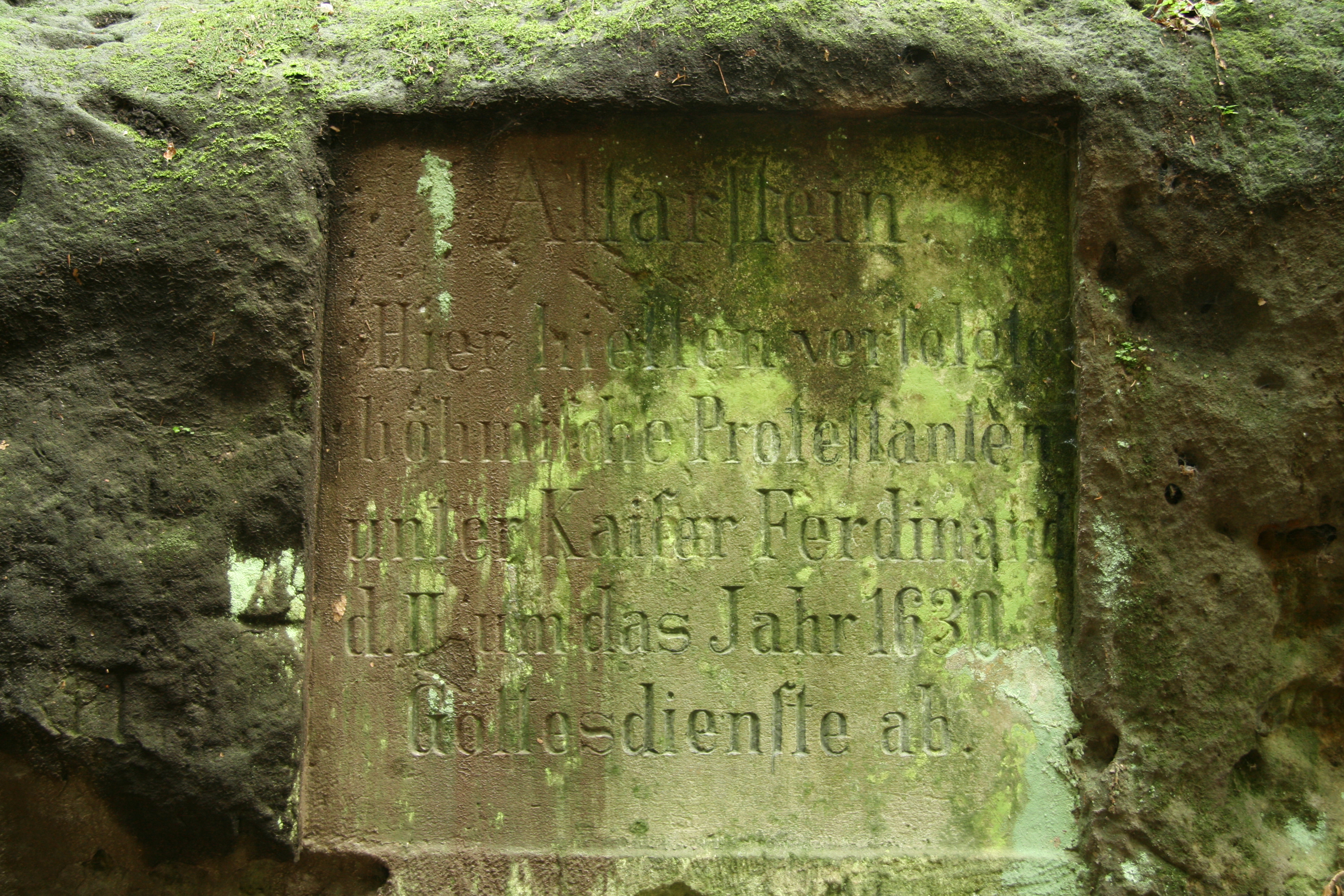 Inschrift des Altarsteins im Kirnitzschtal, Elbsandsteingebirge